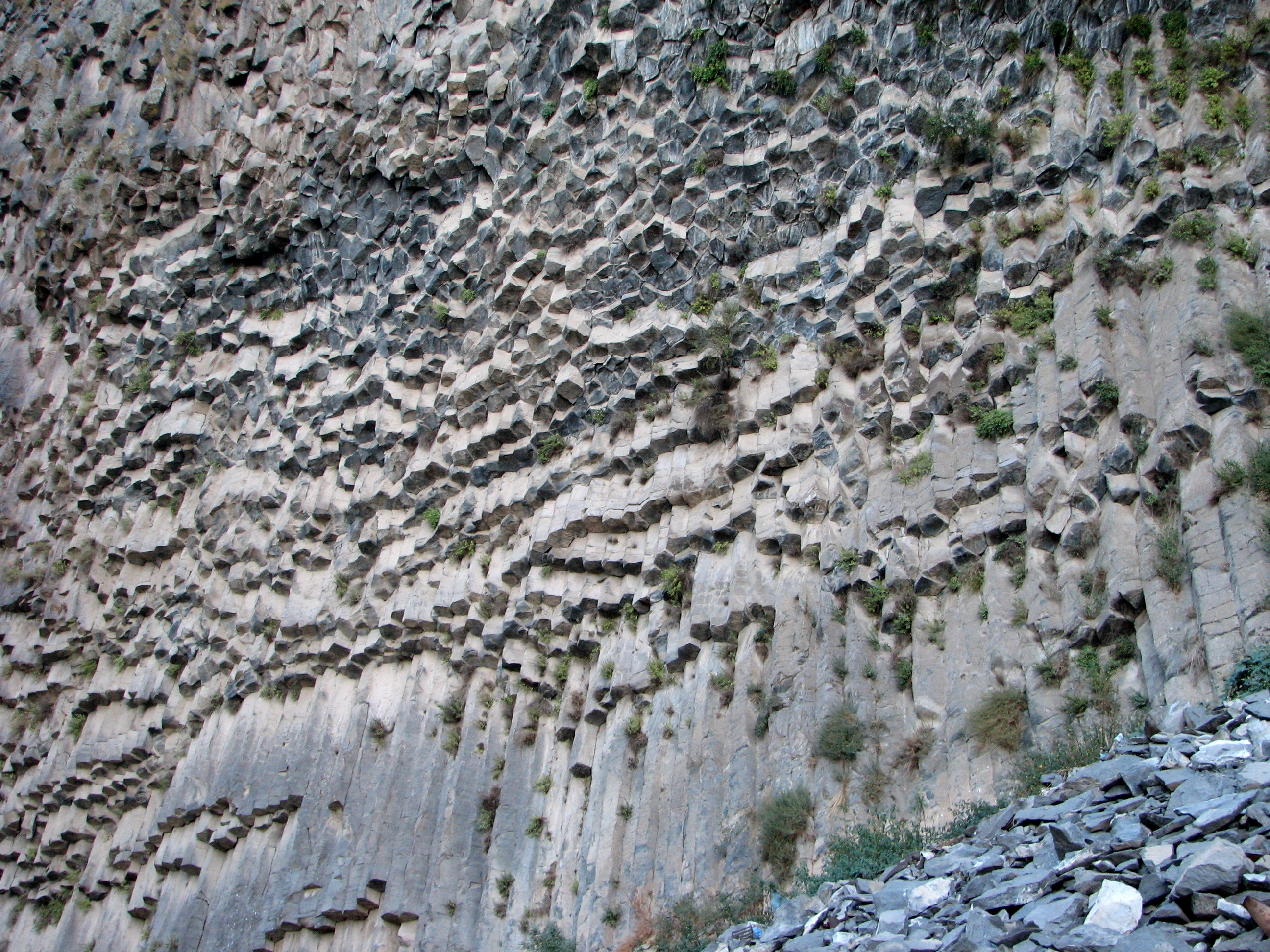 Garni Gorge is situated 23 km east of Yerevan, Armenia קניון גרני נמצא מזרחית לירוואן בירת ארמניה. התופעה המייחדת את הקניון הם עמודי בזלת בצורת משושים